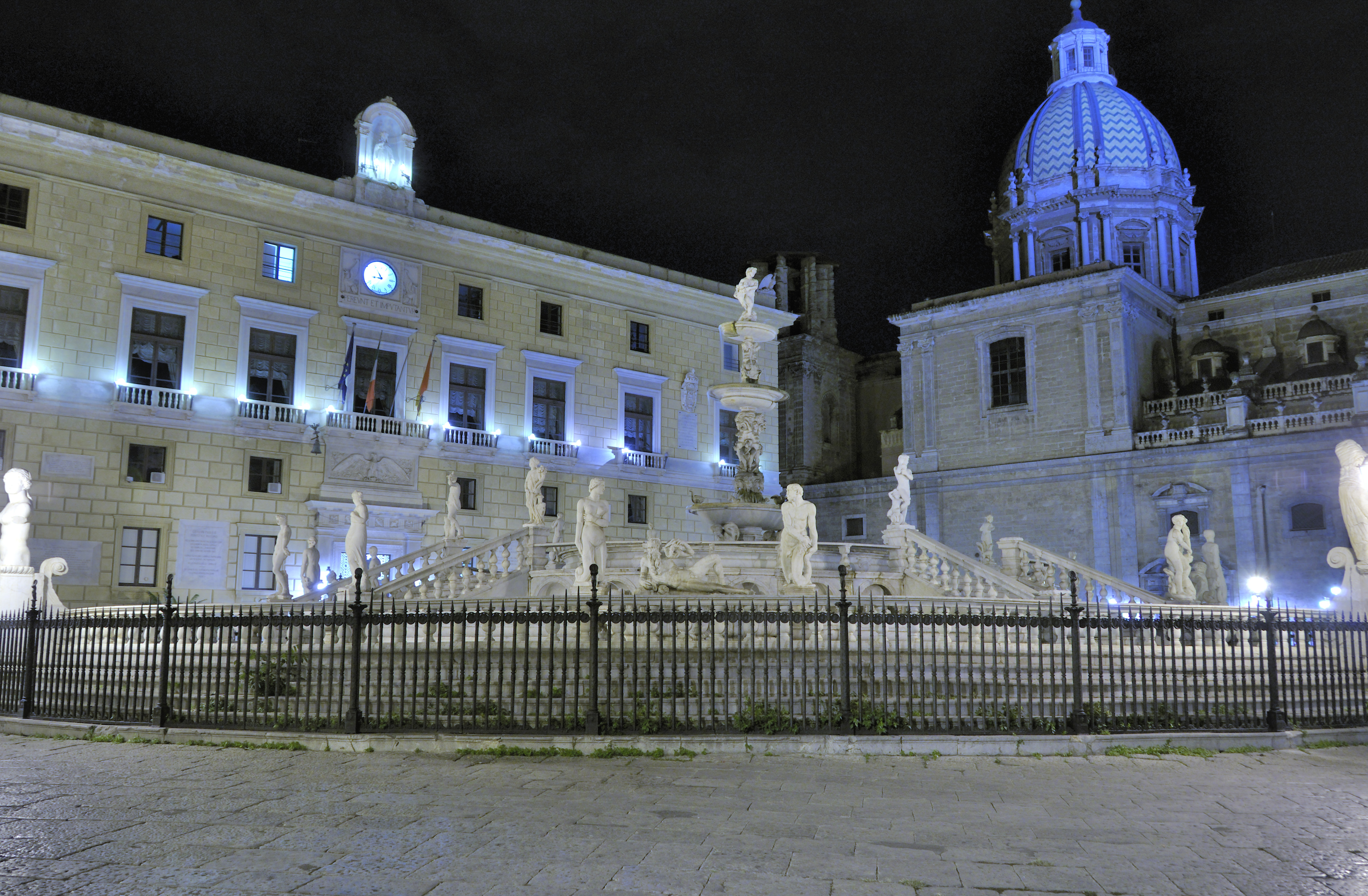 Fontana Pretoria - Fontana della Vergogna « Fonte stupendissima che non ha pari in Fiorenza » Giorgio Vasari La fontana ruota attorno ad un bacino centrale circondato da quattro ponti di scalinate e da un recinto di balaustre ed è costituita da tre vasche concentriche da cui prende l'avvio il gioco d'acqua che viene versata dalla sommità da un Bacco. Distribuite all'interno di questa costruzione architettonica si trovano le statue che raffigurano gli dei dell'Olimpo e i fiumi di Palermo, Oreto, Papireto, Maredolce e Gabriele. Quest'ultima statua rappresentava il fiume toscano Mugnone, famoso nelle novelle di Boccaccio. La parte centrale è circondata dalle raffigurazioni scultoree di varie divinità mitologiche. Tra i monumenti d'età medioevale, tardo-rinascimentali e barocchi del centro storico di Palermo, la fontana rende il Piano Pretore un elemento urbanistico sorprendente.